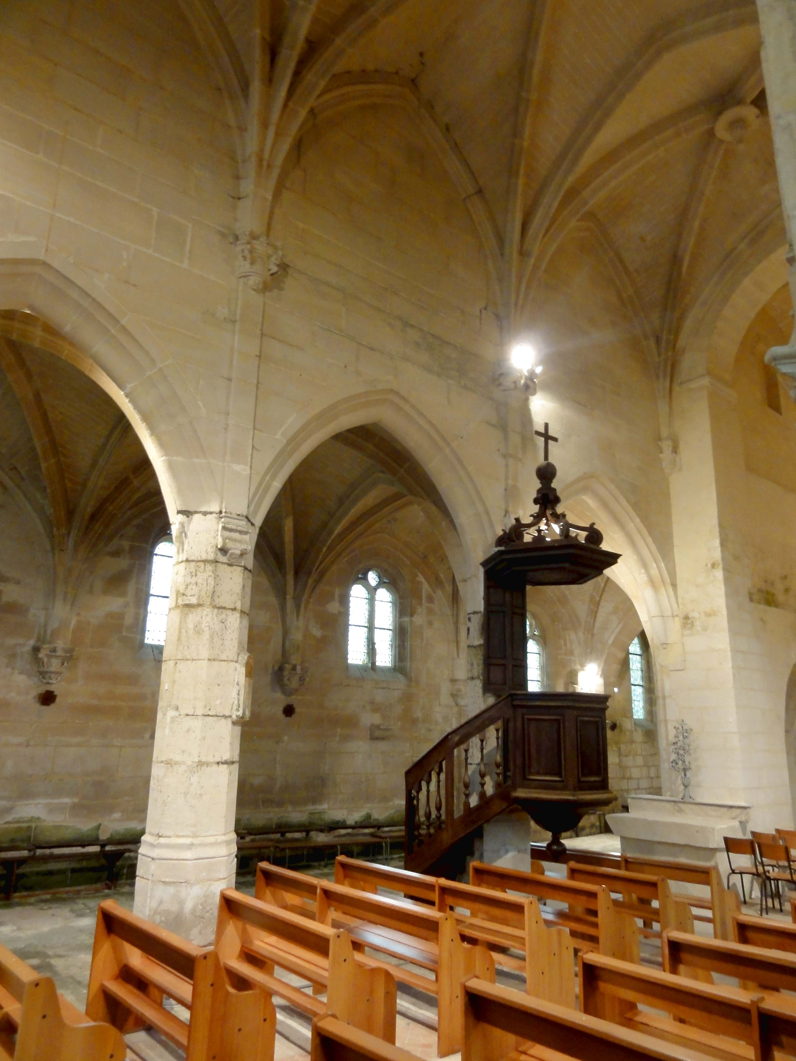 Intérieur de l'église - voir titre.